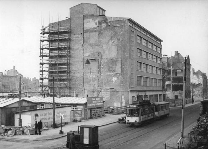 Dresden, Wilsdruffer Straße, HO-Warenhaus im Bau Illus Elbebild 31.1.51 Das grösste HO-Verkaufshaus der Stadt Dresden. In der Wilsdruffer Strasse, Dresden, entsteht das grösste HO-Verkaufshaus der Stadt. Aufn.: 22.1.1951 Information added by Wikimedia users.